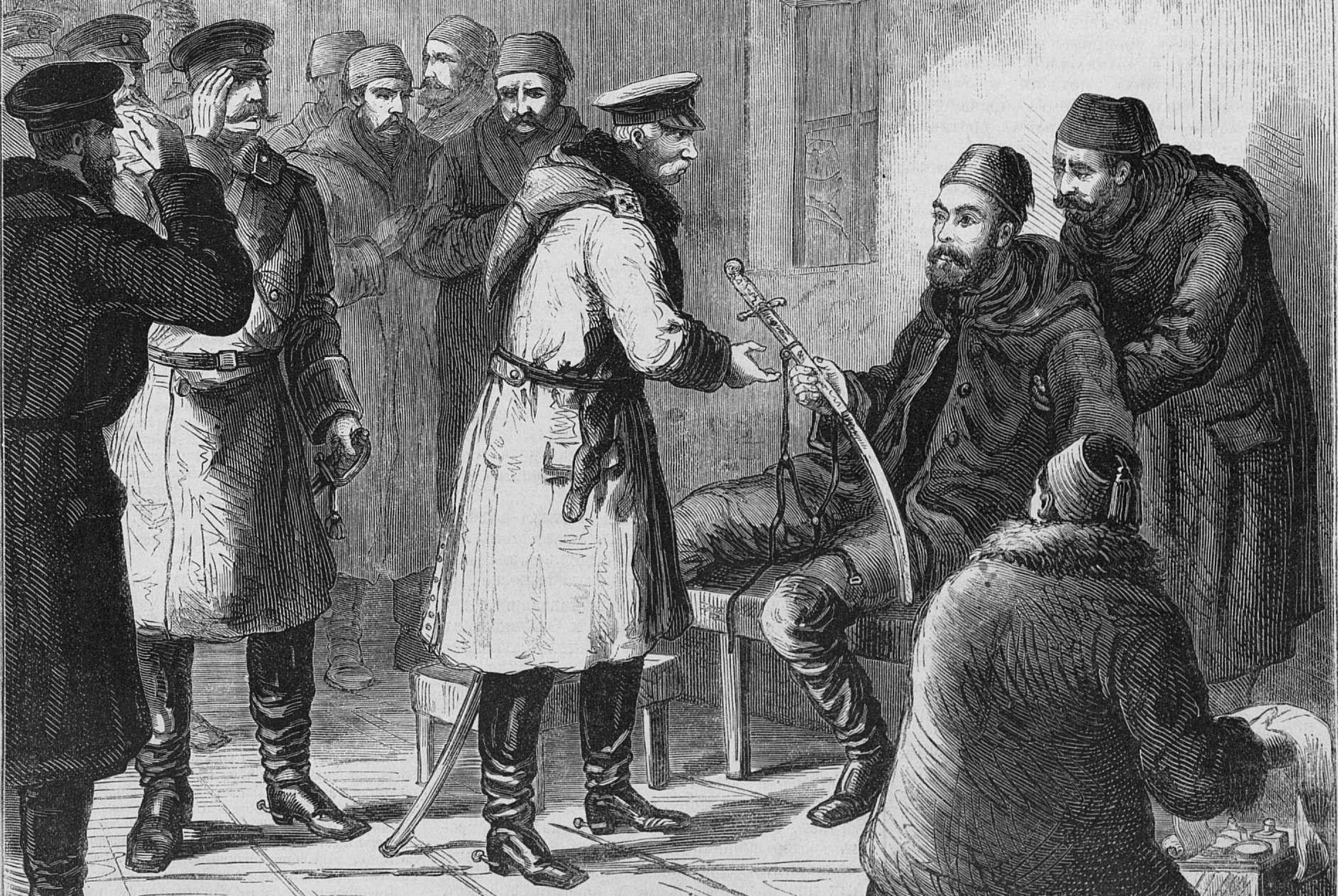 Осман-паша вручает саблю генералу И. В. Ганецкому, 1877 год